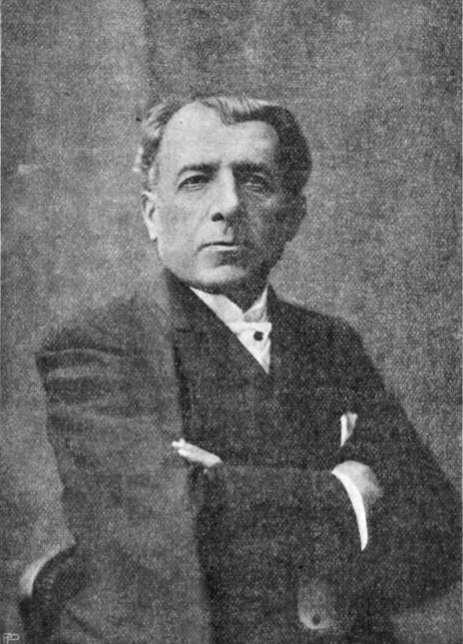 Louis Grégori.